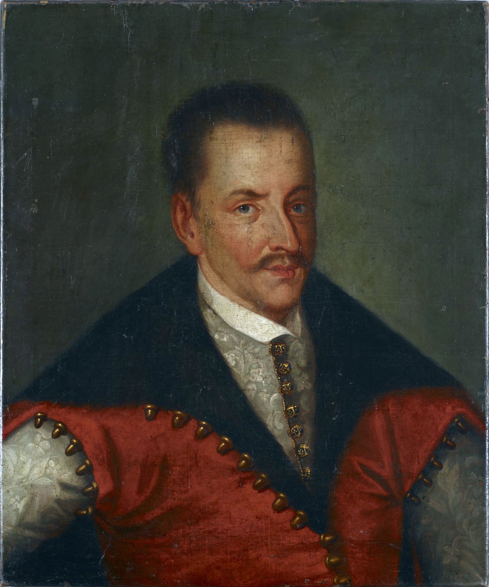 Беларуская (тарашкевіца): Партрэт Рамана Сангушкі (Raman Sanguška)